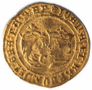 Ducado de oro de Zaragoza del reinado de Juana I de Aragón y Carlos I de Aragón (1516-1555). Oro, 28,5 mm diámetro.